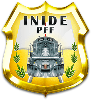 INIDE PFF (Instituto Nacional de Instrução e Desenvolvimento da Polícia Ferroviária), atuais responsáveis pela Polícia Ferroviária Federal